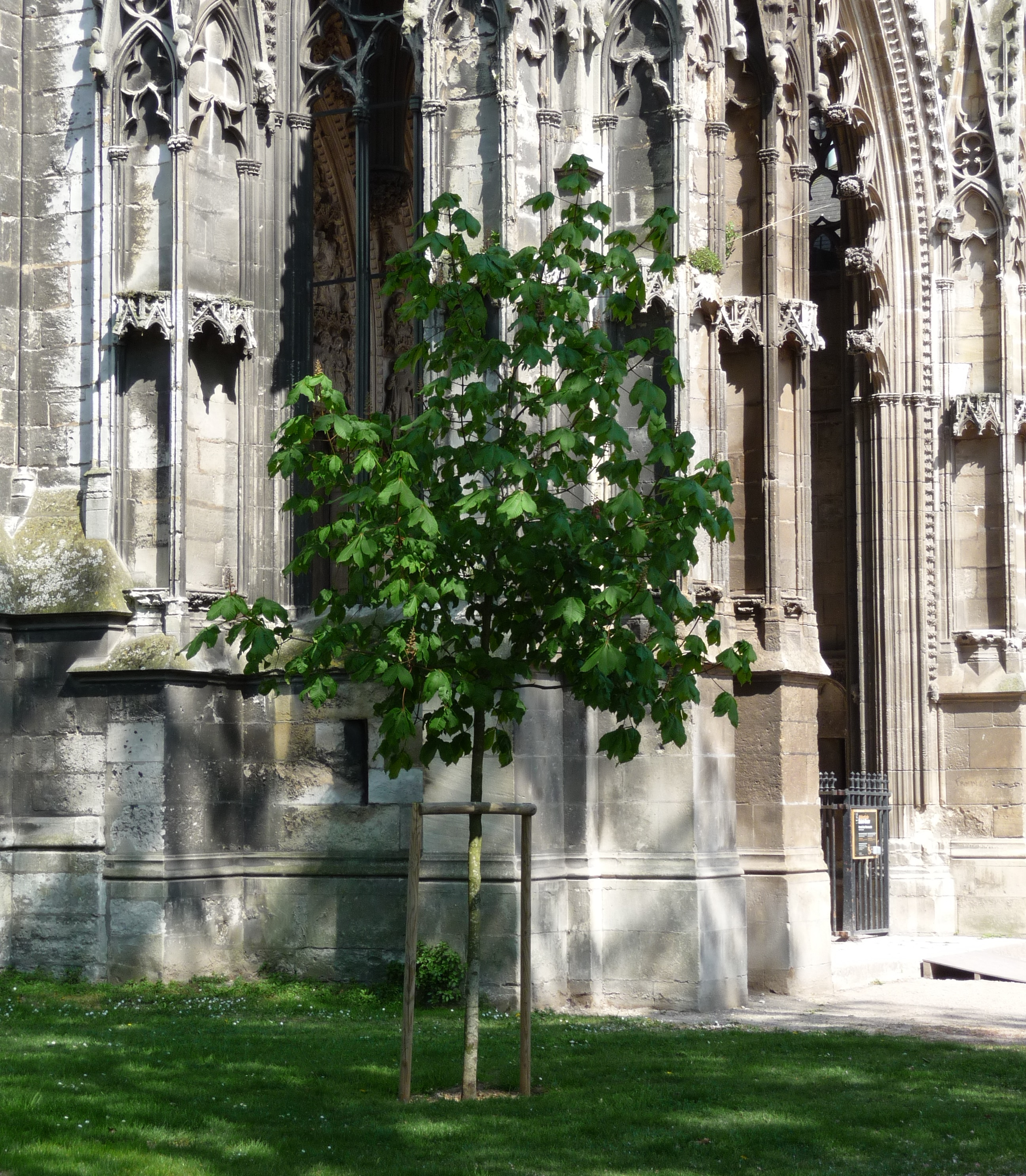 Arbre de la laïcité planté en 2014, au pied de l'Abbaye de Saint-Ouen (catholique), par la municipalité de Rouen (coalition socialiste-communiste-écologiste) et son maire Yvon Robert (socialiste), en présence de l'ancienne ministre et députée Valérie Fourneyron (socialiste) ainsi que du Comité départemental d'action laïque. L'arbre est situé à côté du portail des Marmousets (entrée latérale usuelle dans l'Abbaye). Localisation sur Google Maps : Latitude : 49°26'32.1"N - Longitude : 1°05'58.9"E. Articles de presse : « La Ville de Rouen plante un deuxième arbre de la laïcité », Actu76, 13 Décembre 2014. « Plantons sous la pluie », Rouen Magazine n°428, Page 22.